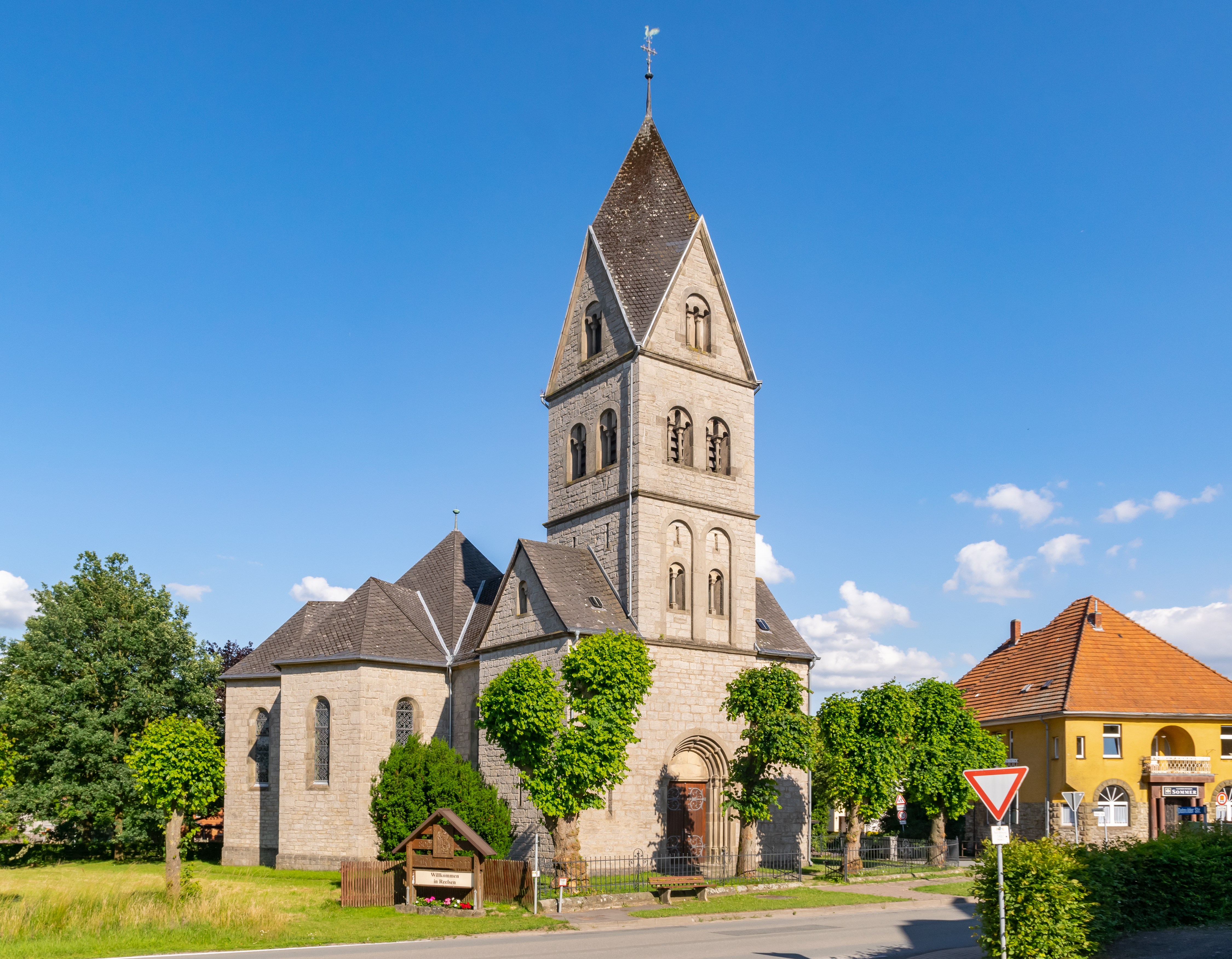 Katholische Kirche St. Martinus in Bad Driburg-Reelsen